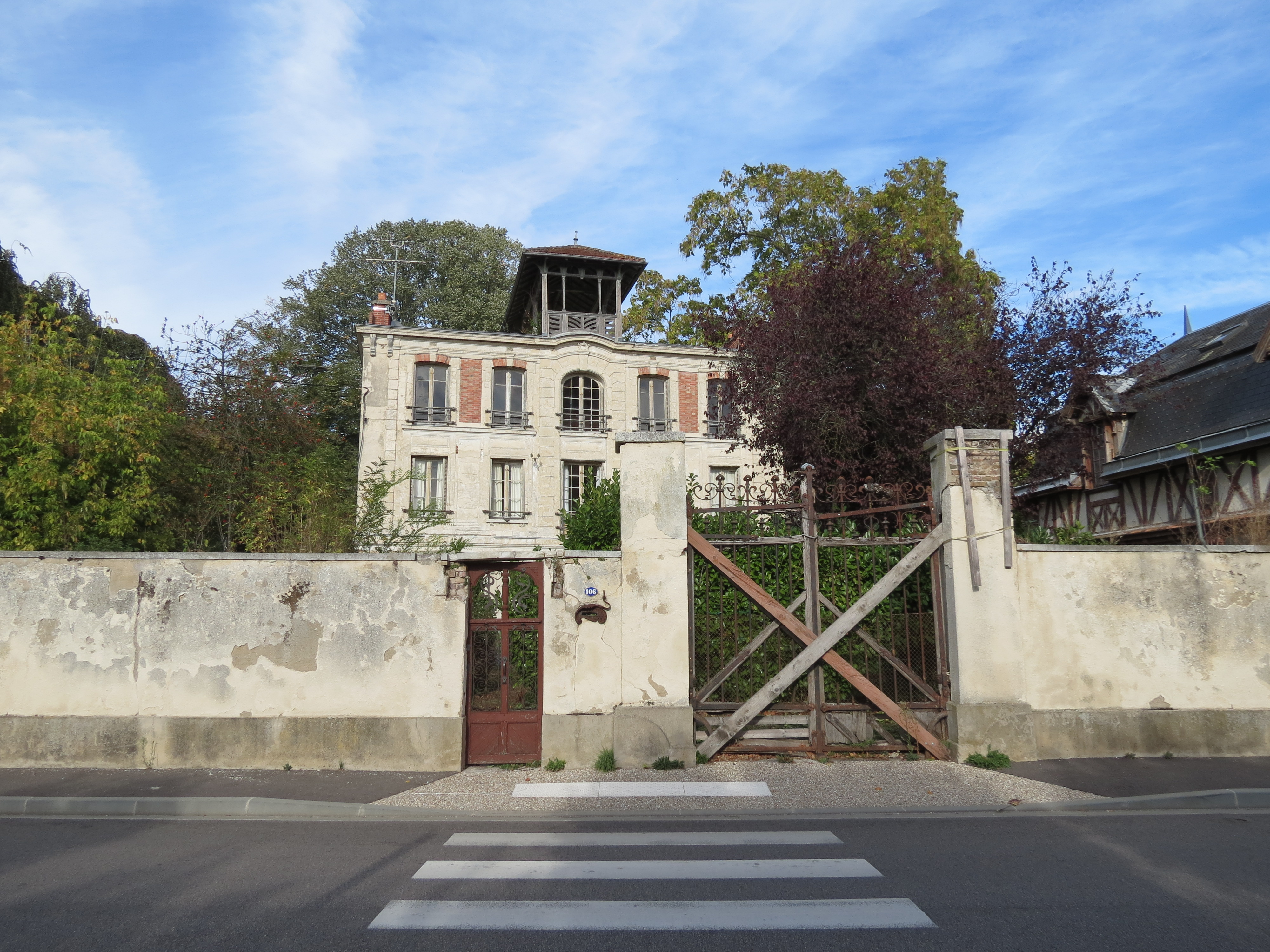 Maison face à l'église à Port-Mort.